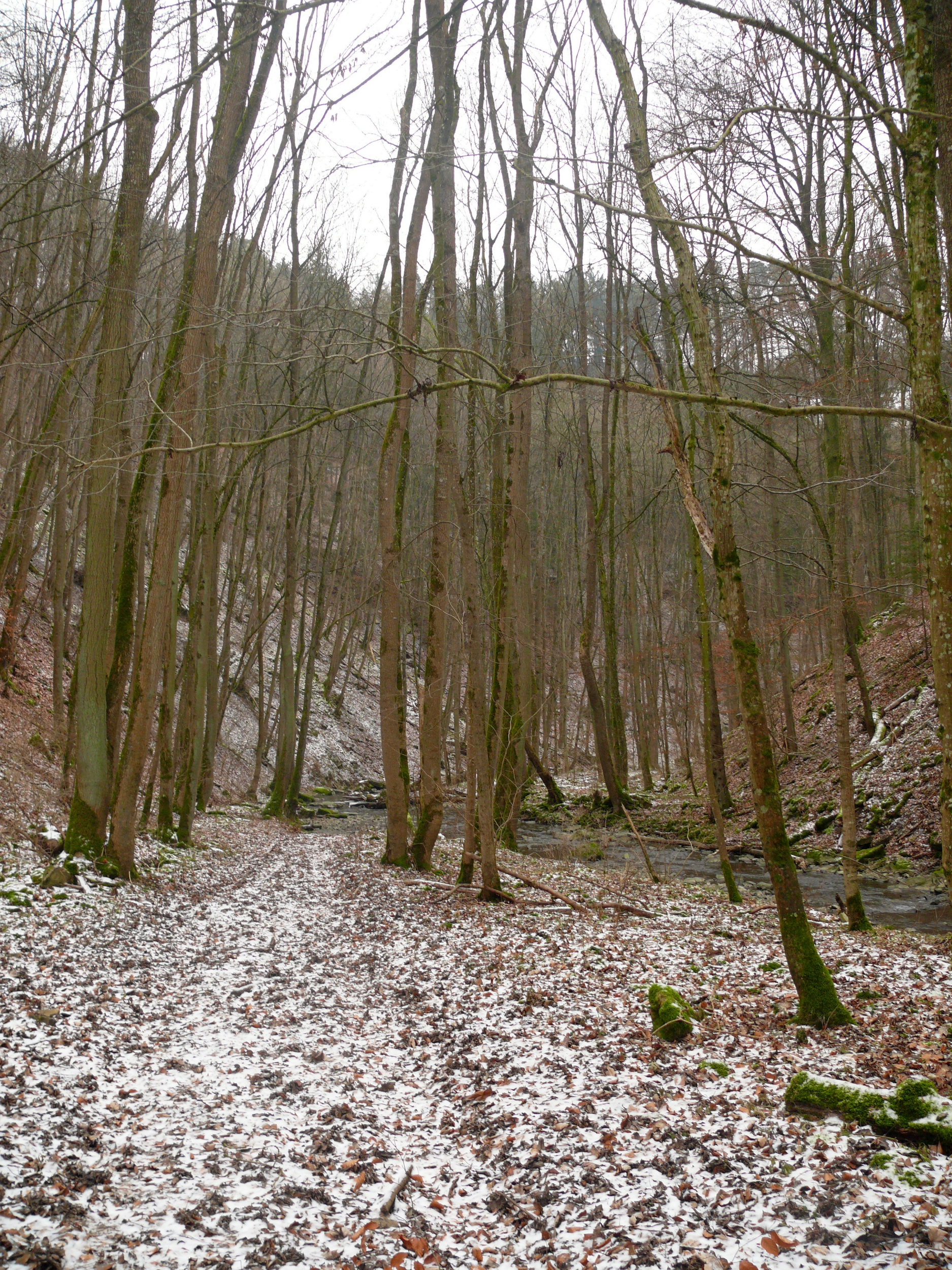 Schmerach unterhalb der ehem. Burg Klingenfels, Steinbächle, Ilshofen, Germany